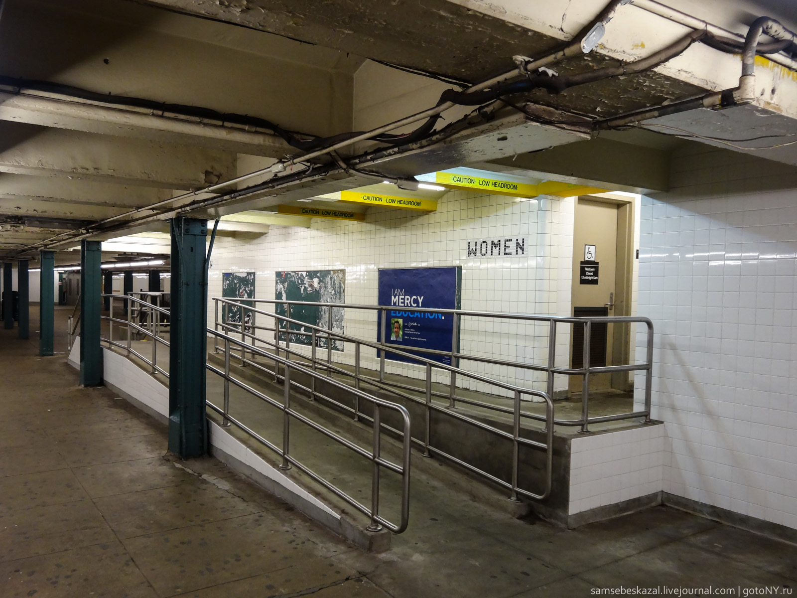 02845.jpg